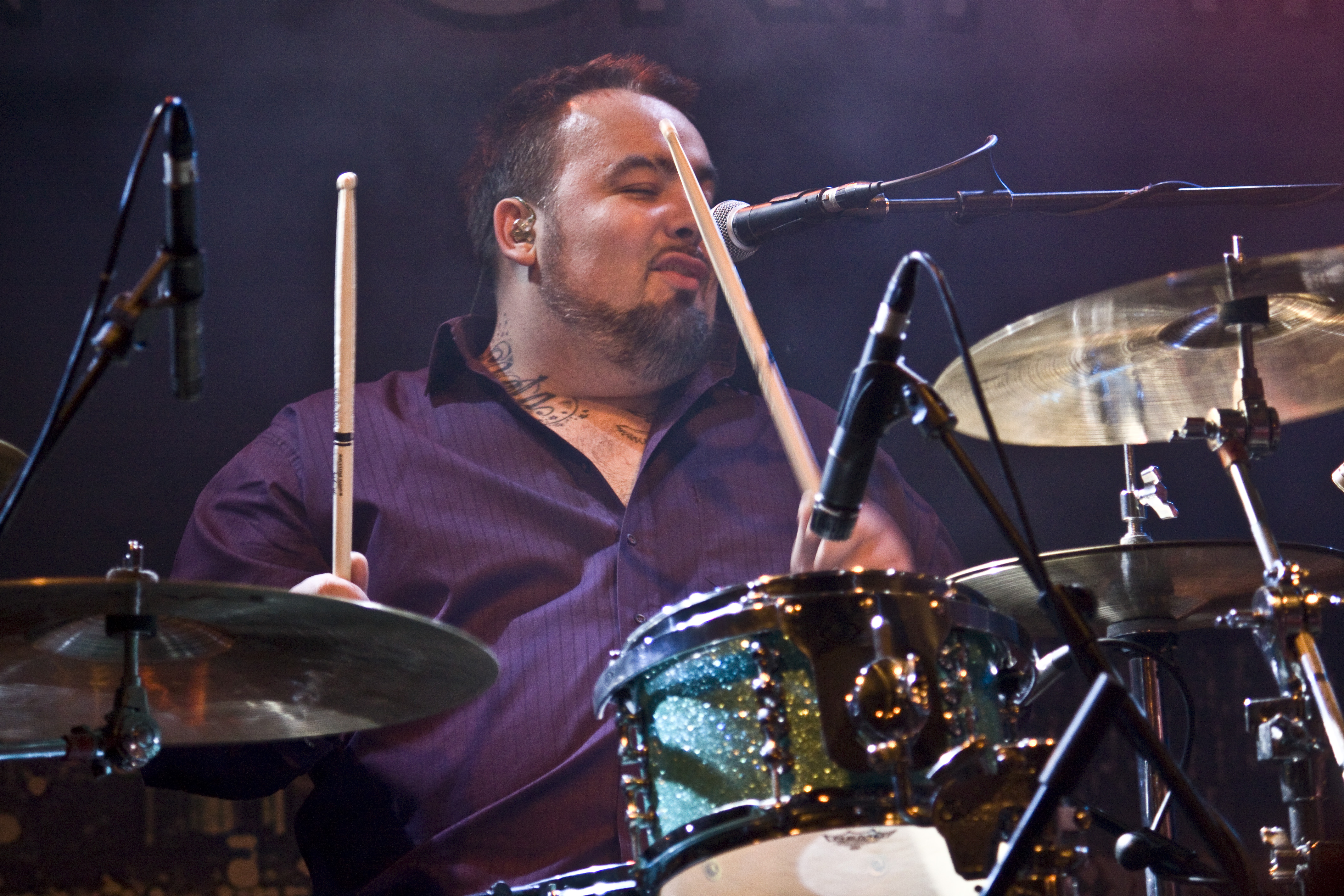 Fun Lovin' Criminals en la Sala Bikini, Barcelona, España. Fotos: Rosario López Podéis leer una crónica del concierto en